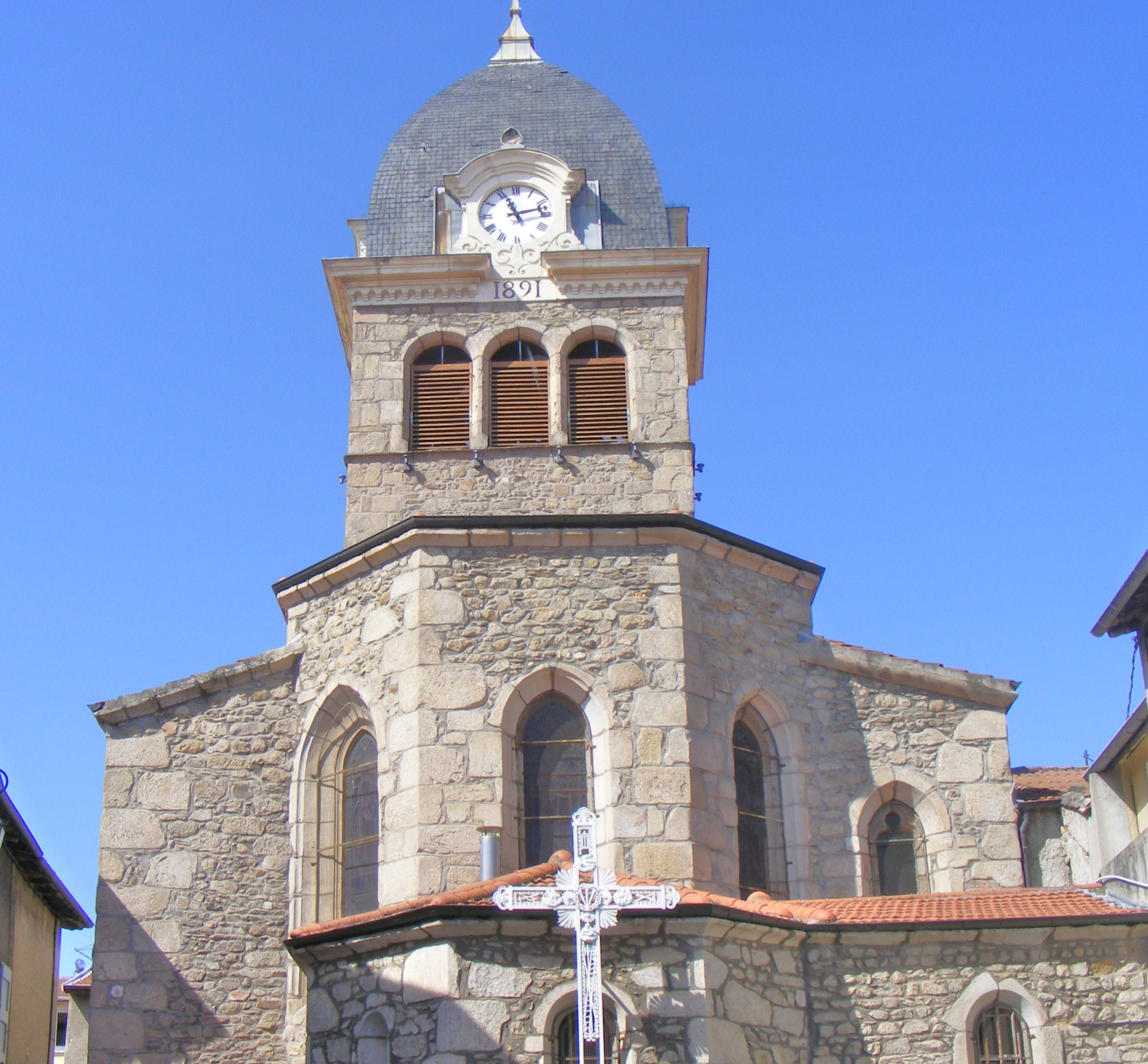 Saint-Andéol-le-Château (Rhône, France)